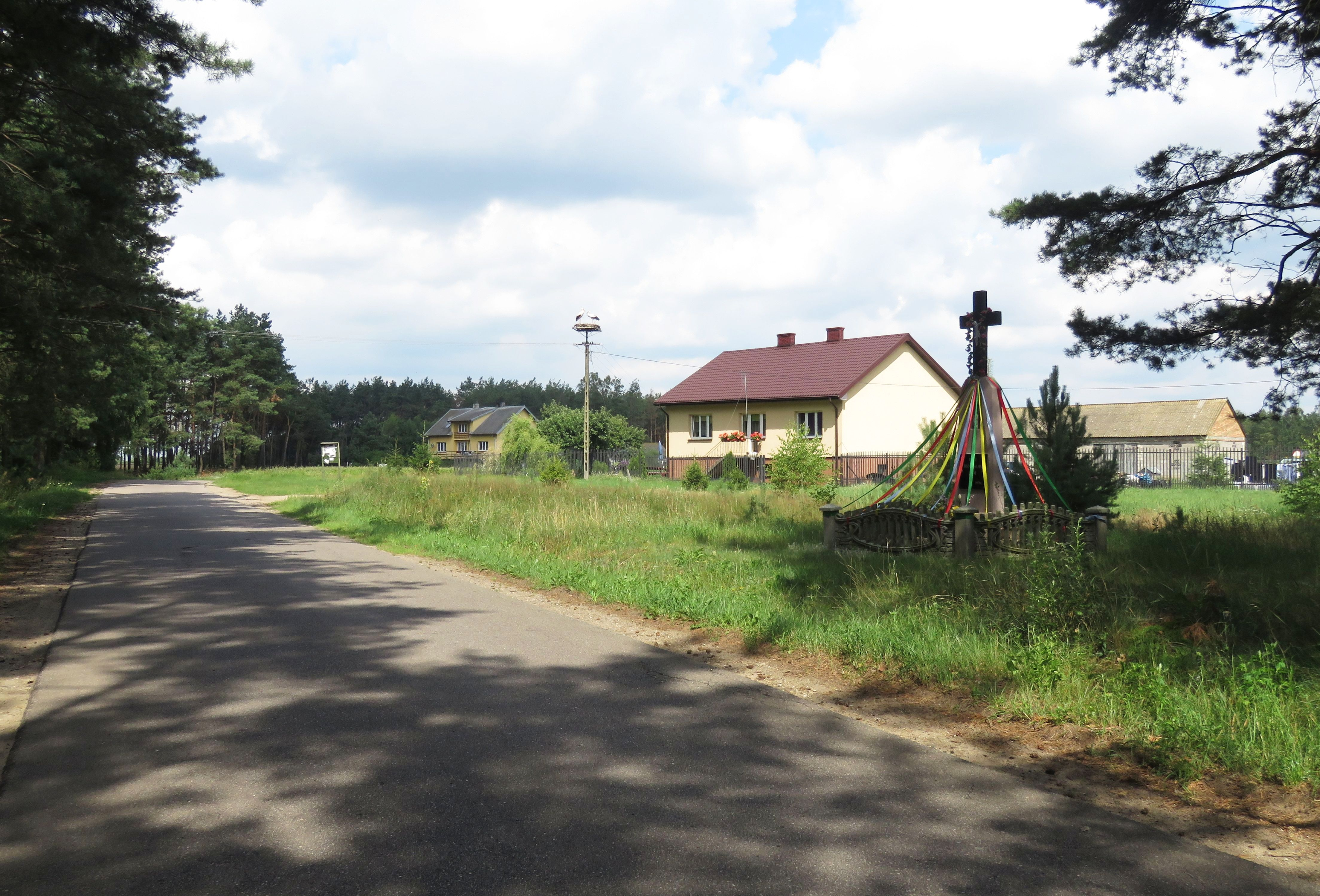 Kraszewo Rory